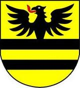 Wappen Attinghausen UR